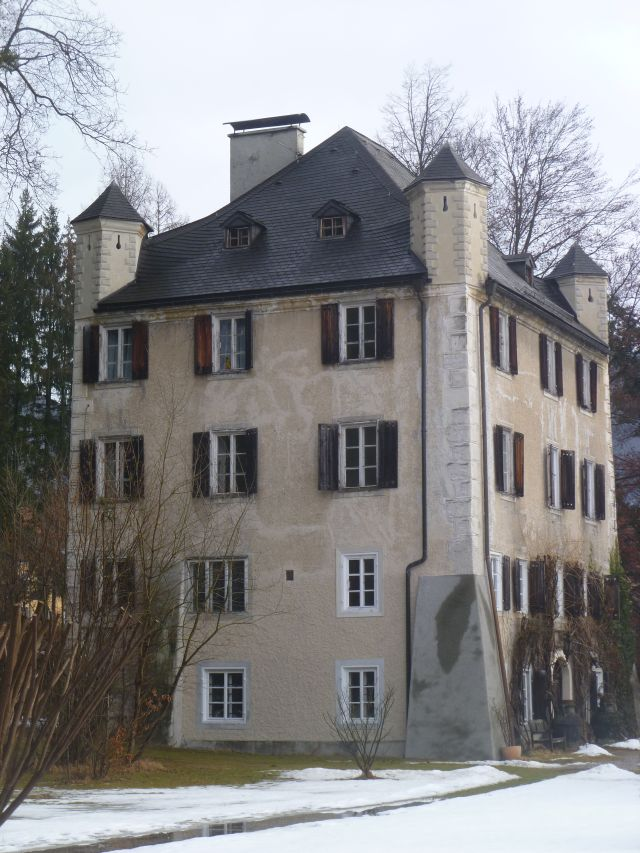 Flederbachschlösschen